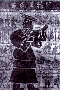 山东济宁东汉武梁祠的石刻像( 此像为国内现存最早的黄帝像)